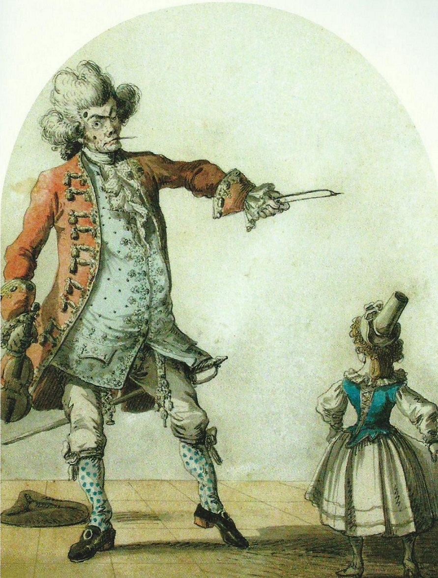 Lekcja tańca